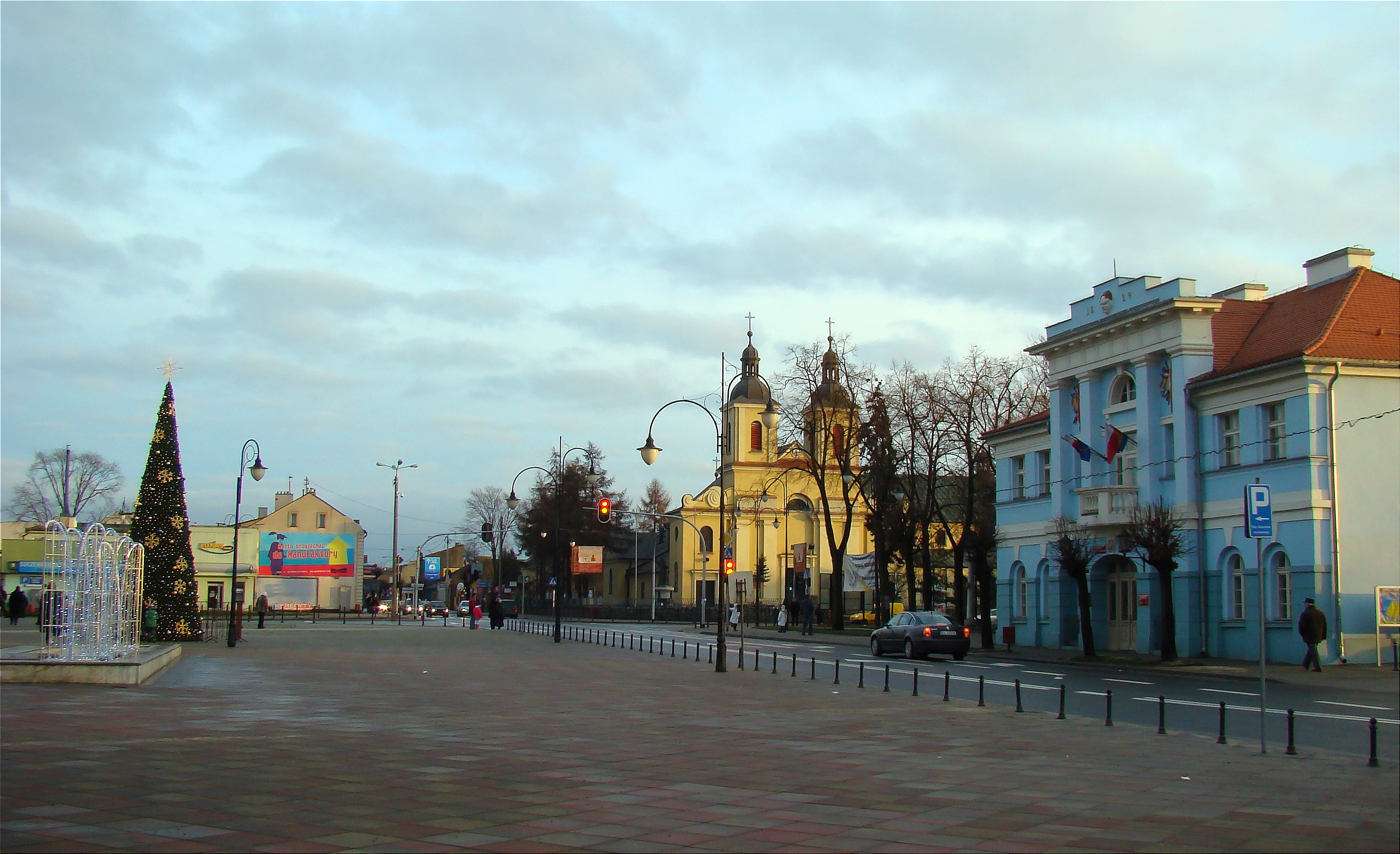 Plac Tadeusza Kościuszki w Aleksandrowie Łódzkim (powiat zgierski, województwo łódzkie), Polska